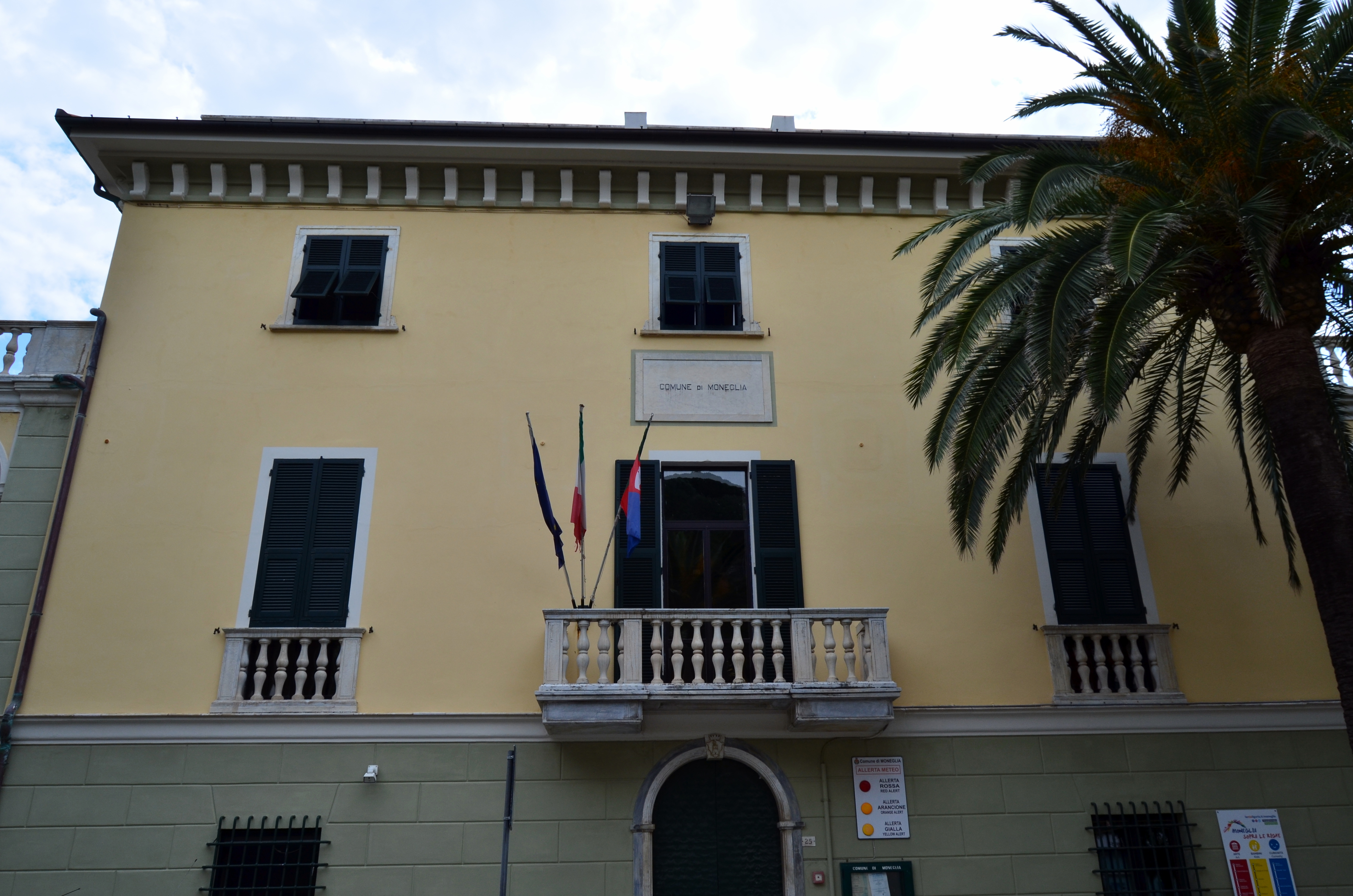 Municipio di Moneglia, Liguria, Italia